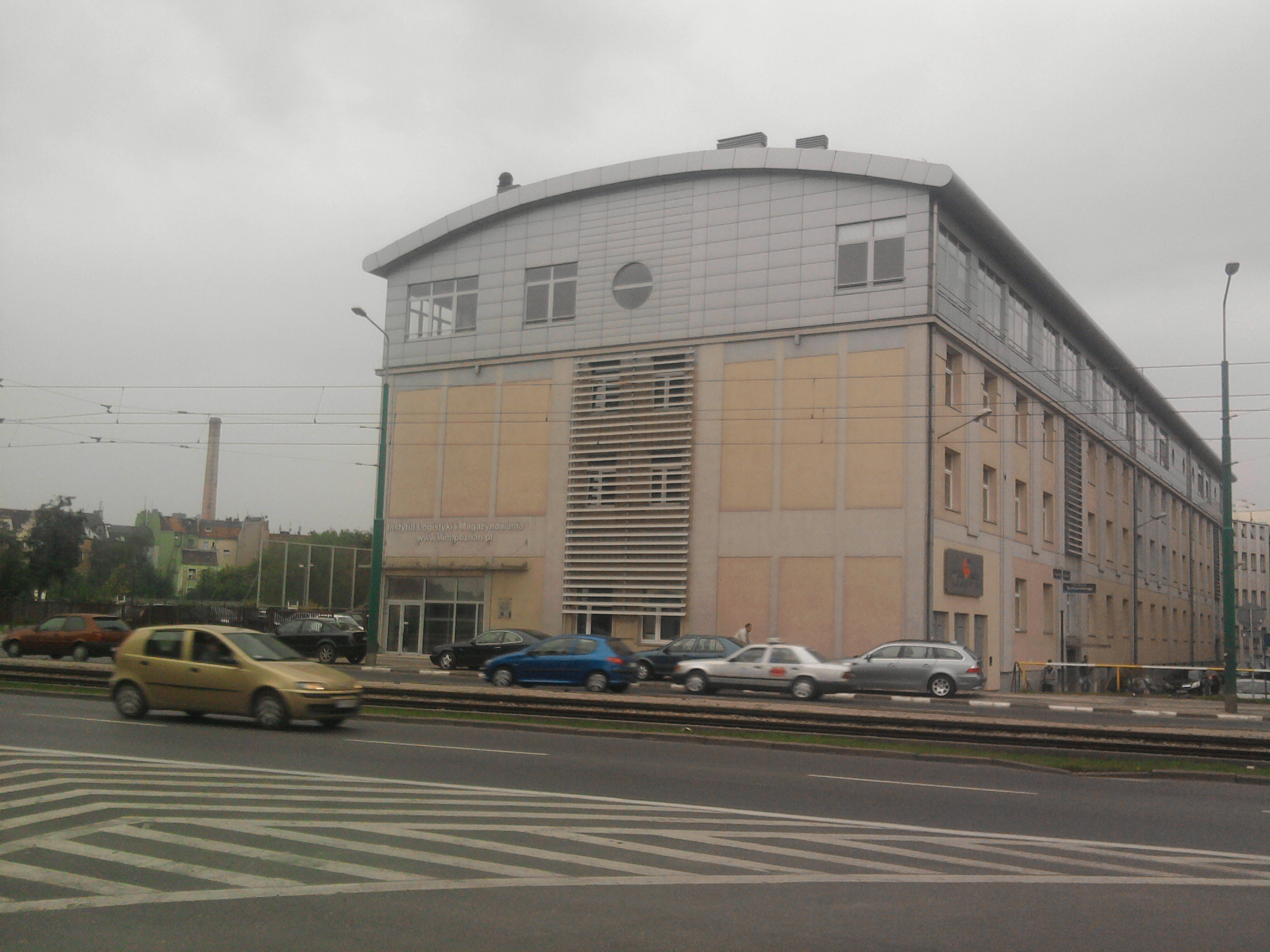 Instytut Logistyki i Magazynowania - wejście z przodu Wyższa Szkoła Logistyki - wejście z prawej strony